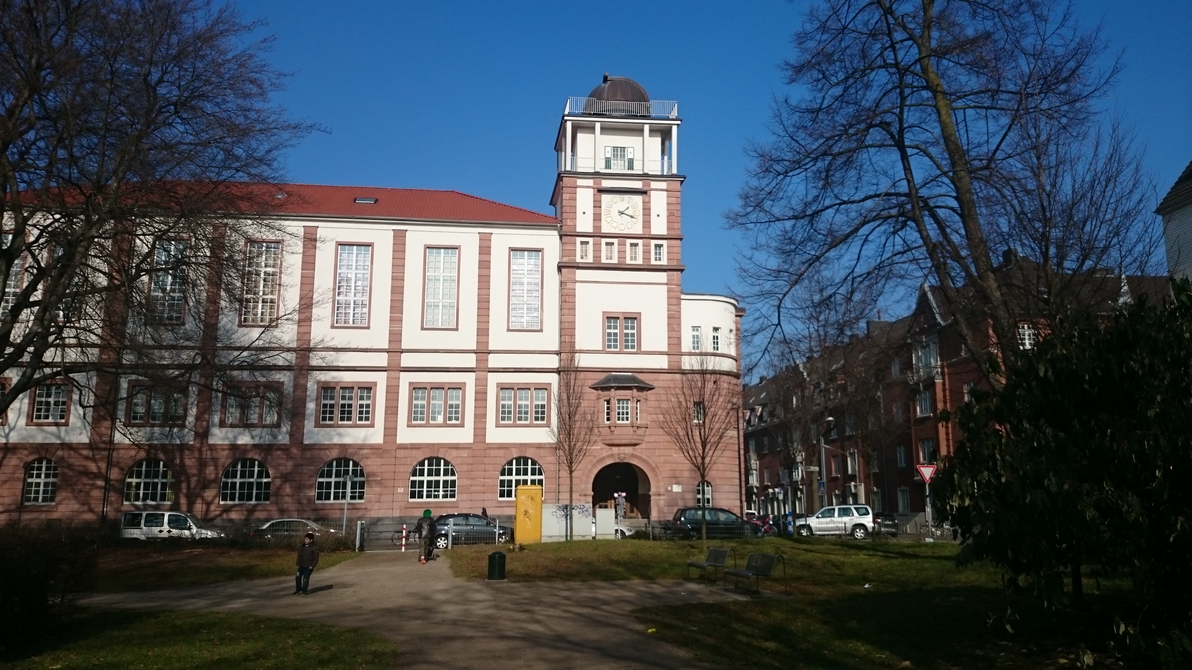 Das Gymnasium Köln Nippes, vom Leipziger Platz fotografiert im Februar 2015.